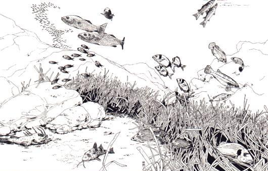 Illustrazione dell'ecosistema di Posidonia oceanica